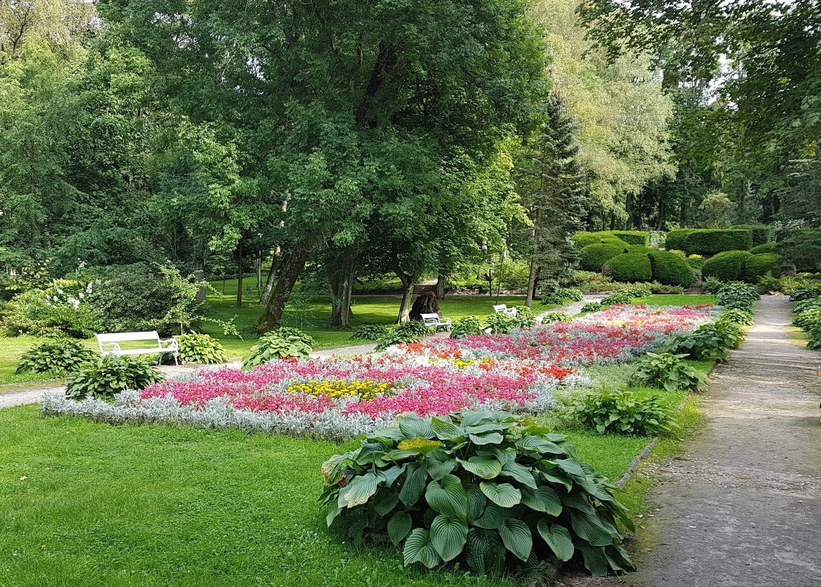 Park Zdrojowy, 2017